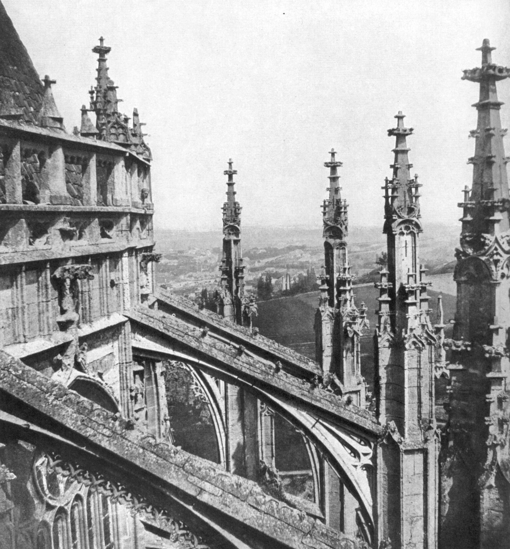 A. Groll - Opěrné oblouky vysokého chóru chrámu svaté Barbory v Kutné Hoře, 1856